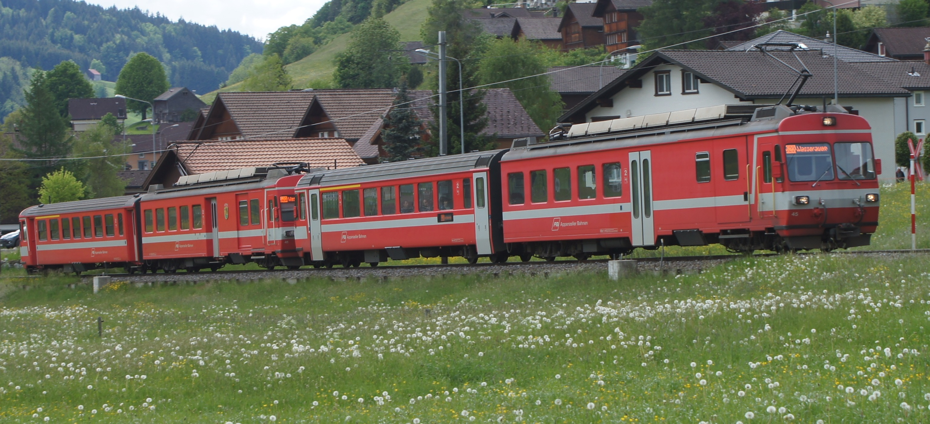 Triebwagen BDe 4/4 41 und 45 der Appenzeller Bahnen mit ihren Steuerwagen ABt 141 (EW II FFA) und 145 (PA-90 FFA) zwischen bei Gonten